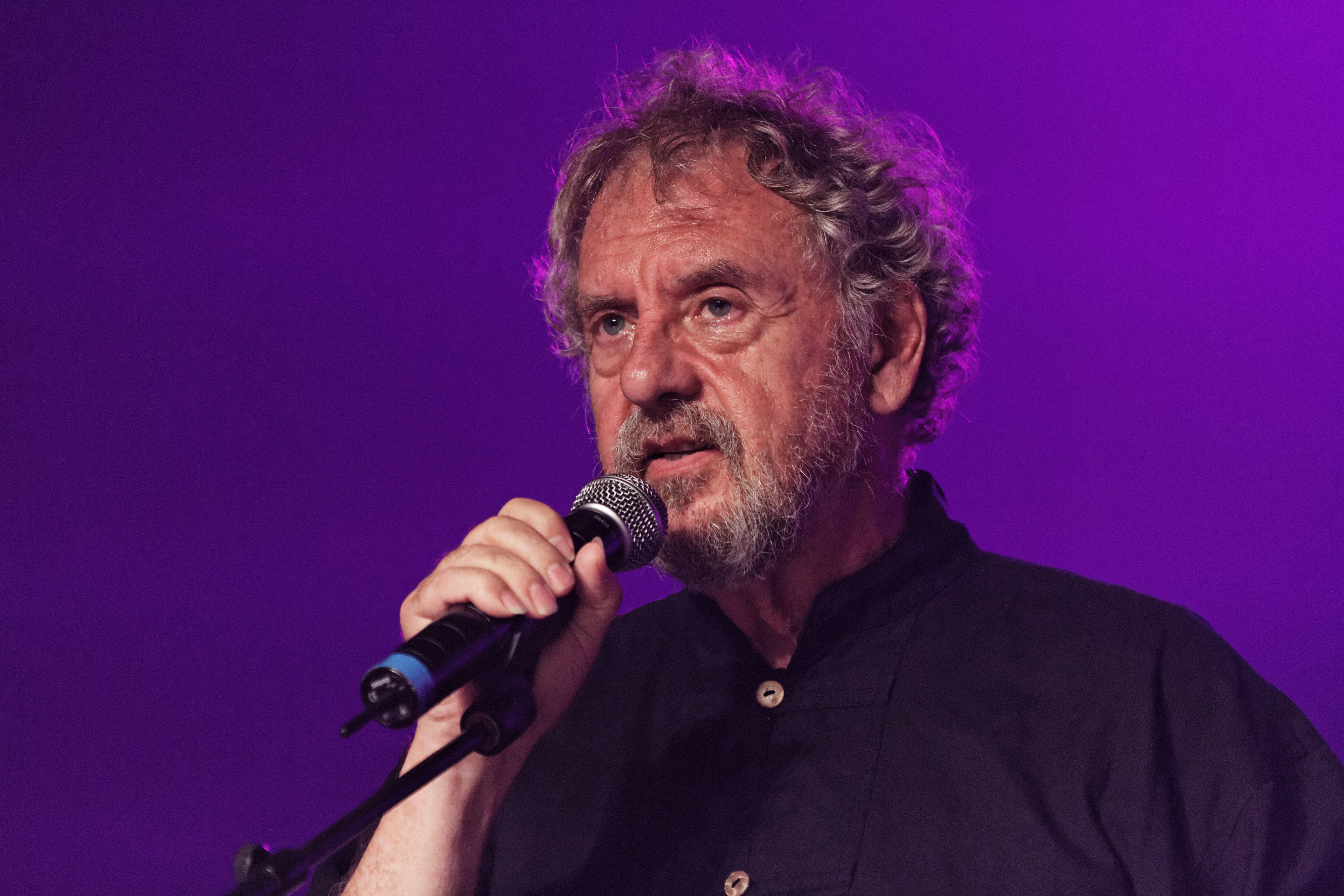 Dan ar Braz en concert sur la scène Gradlon lors du festival de Cornouaille 2013.